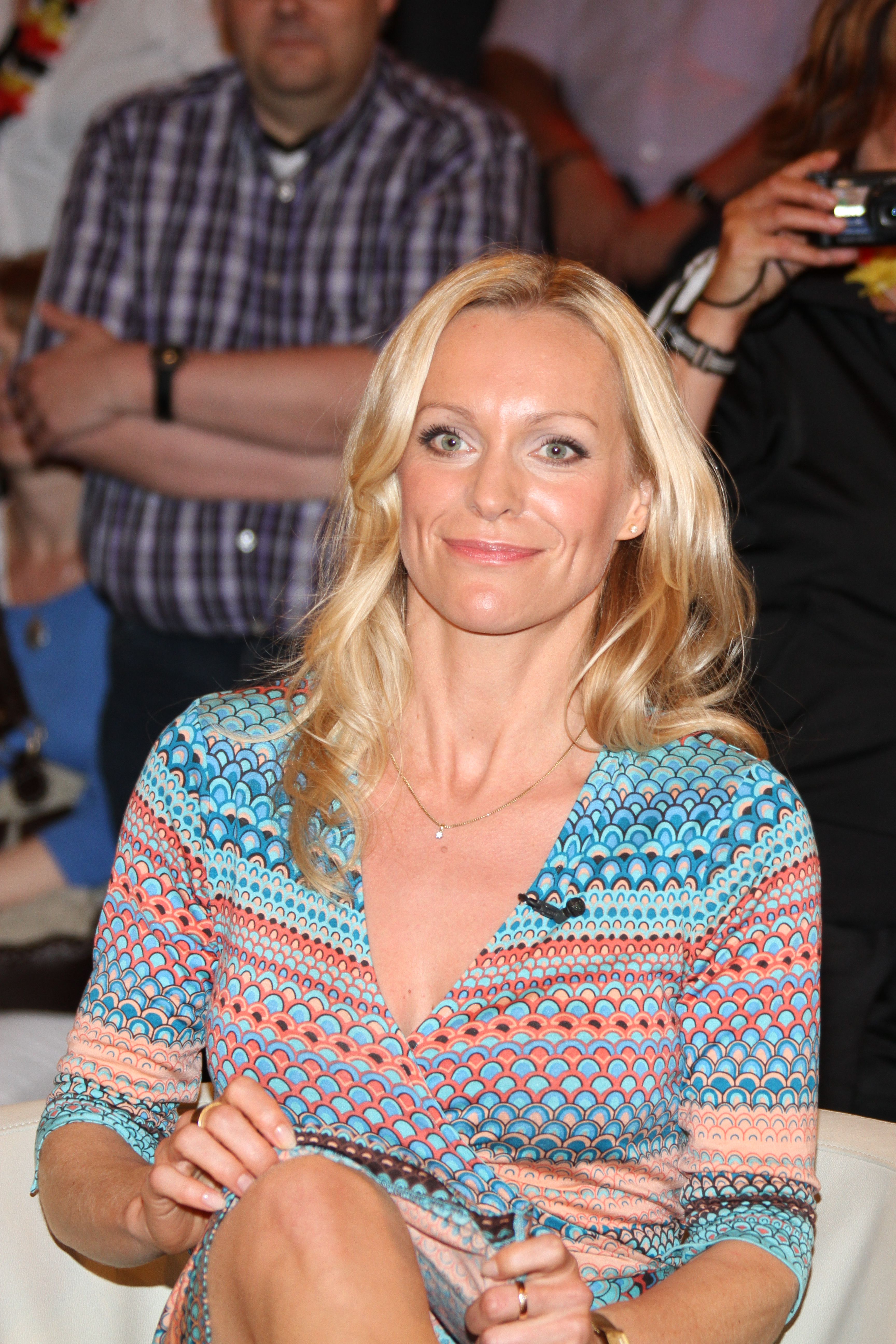 Valeska Homburg (* 3. Januar 1976 in Wolfsburg) ist eine deutsche Journalistin und Moderatorin.